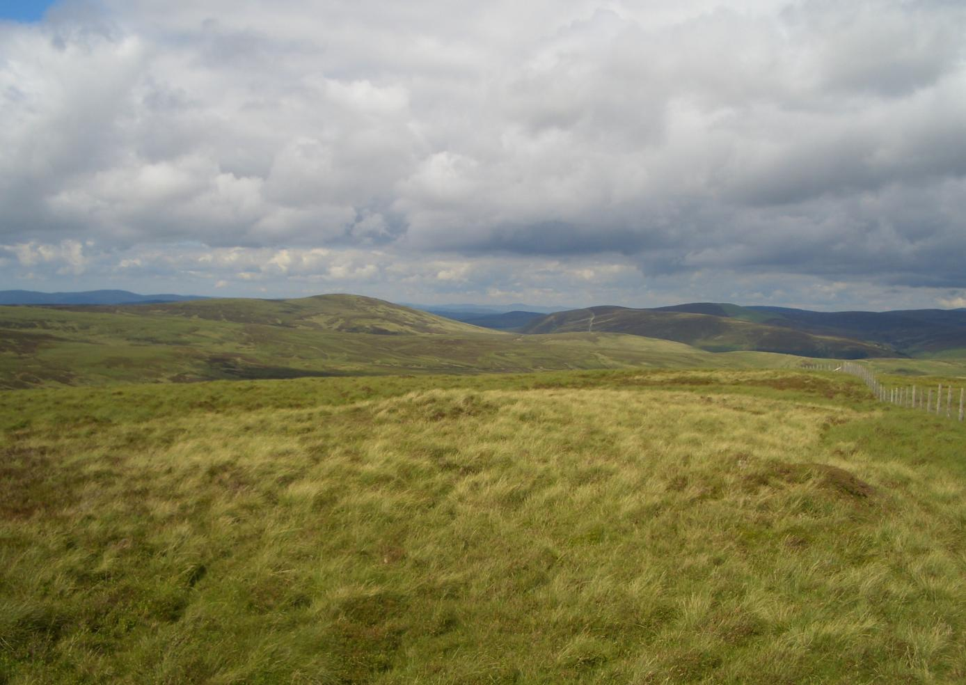 stac rhos